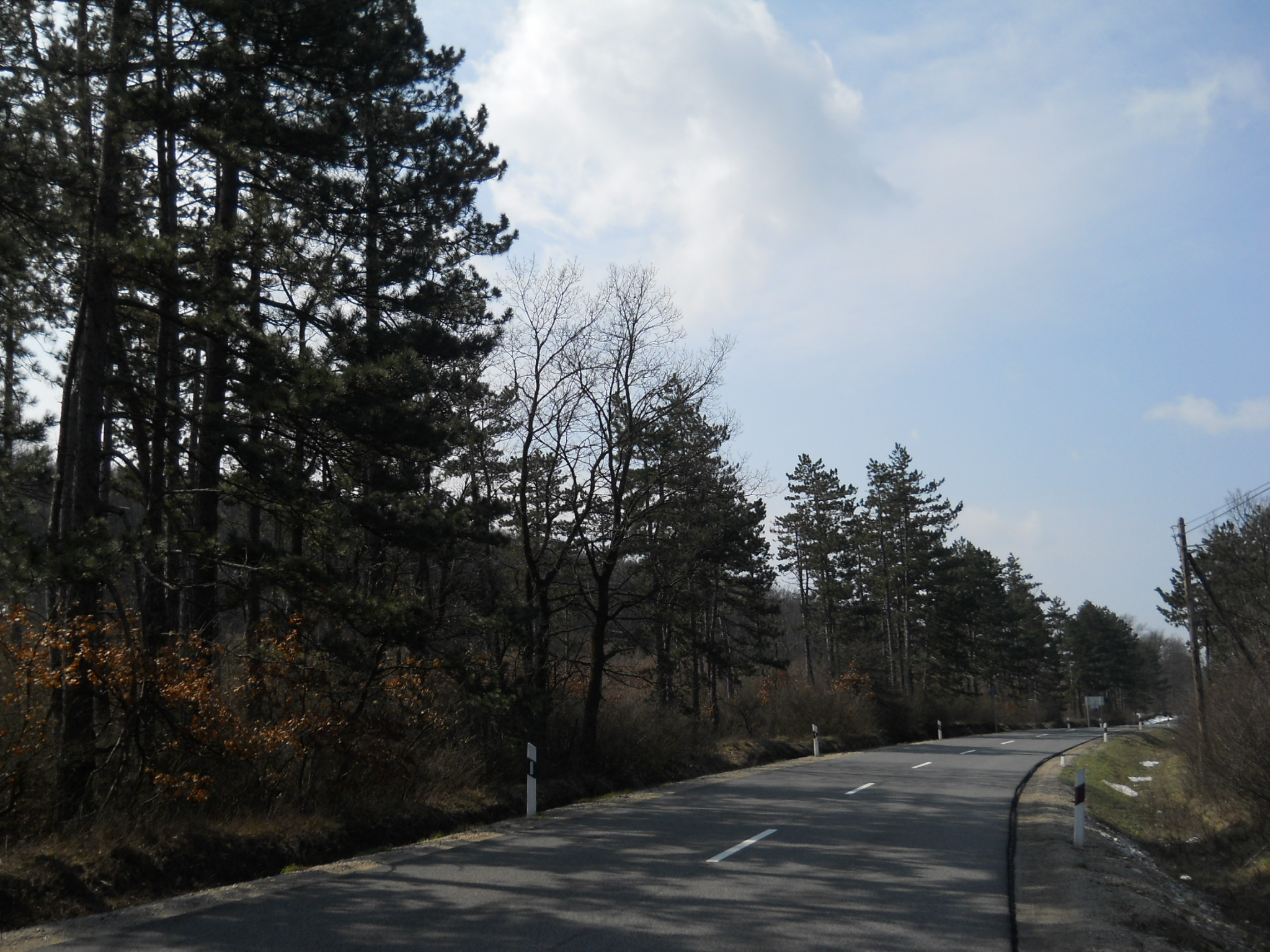 Csákvár - a Kőhányáspuszta és Gánt közötti országút Csákvár határában